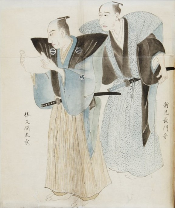 目付新見正登(右)と佐久間信近(左)の肖像。